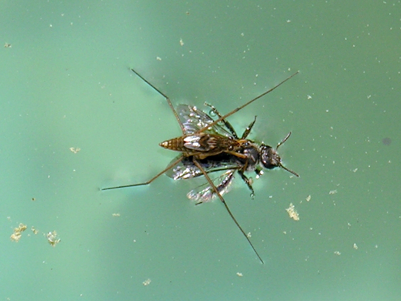 Foto tirada cunha Nikon E8800. Self made. Bastabales - Galicia - Spain Hygrotechuis conformis Zapateiro ceando. Zapatero cenando